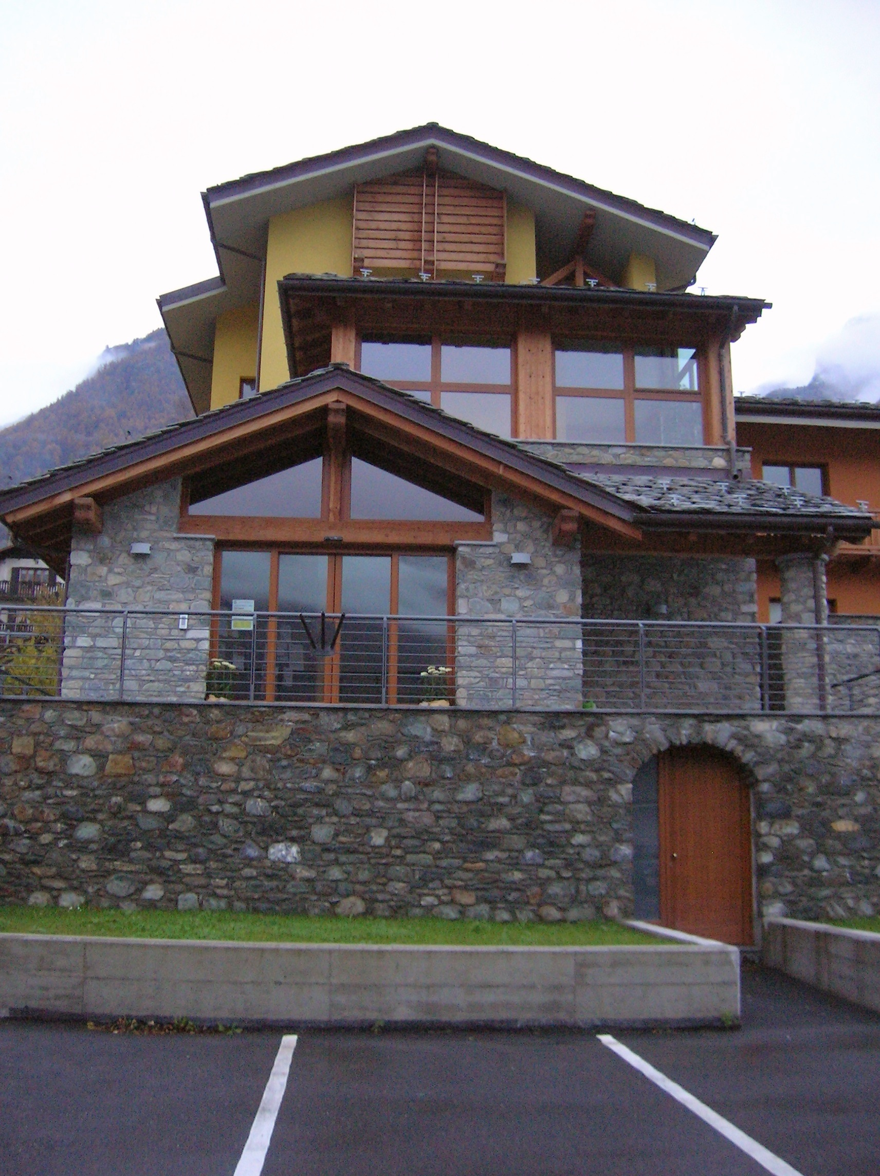 Municipio e biblioteca di Saint-Marcel, Valle d'Aosta, Italia.